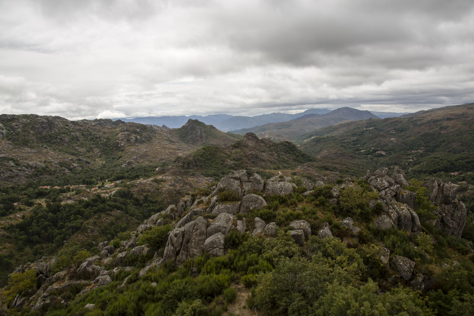 excursion castro laboreiro-30